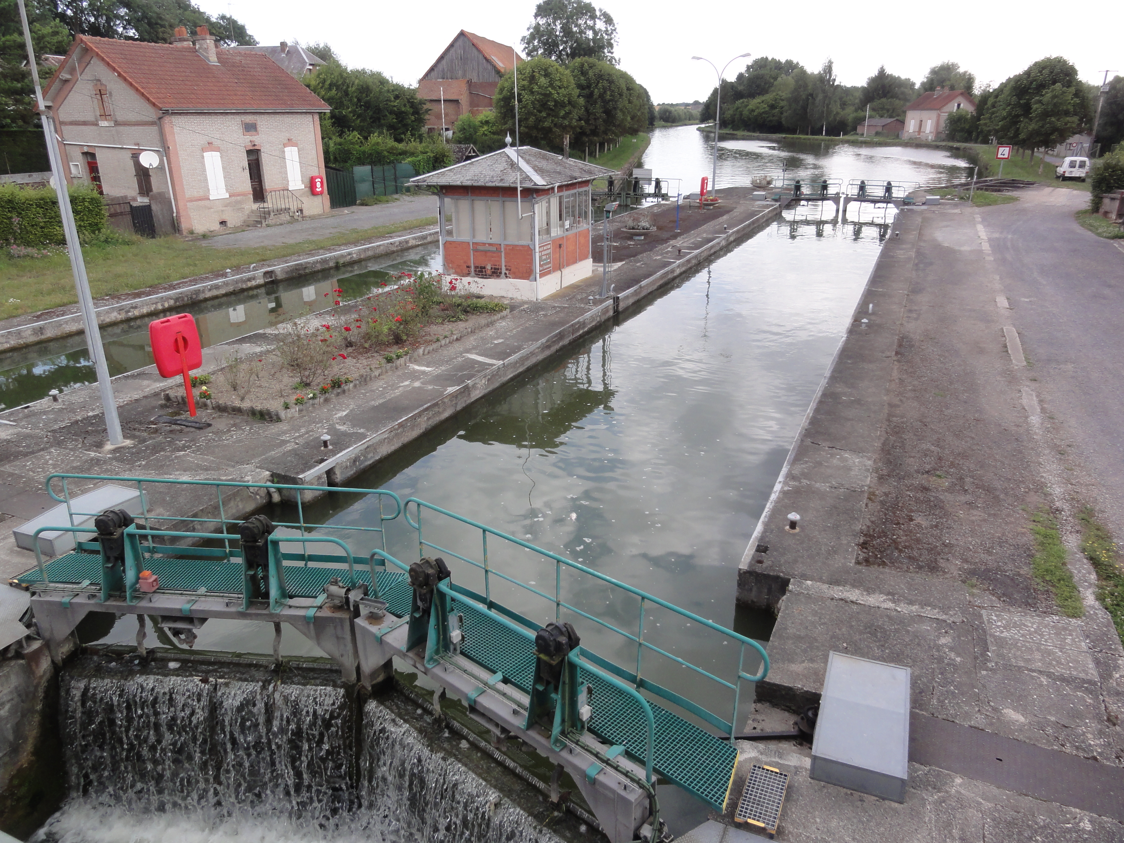 Fontaines-lès-Clercs (Aisne) Canal de Saint-Quentin, écluse vue du pont